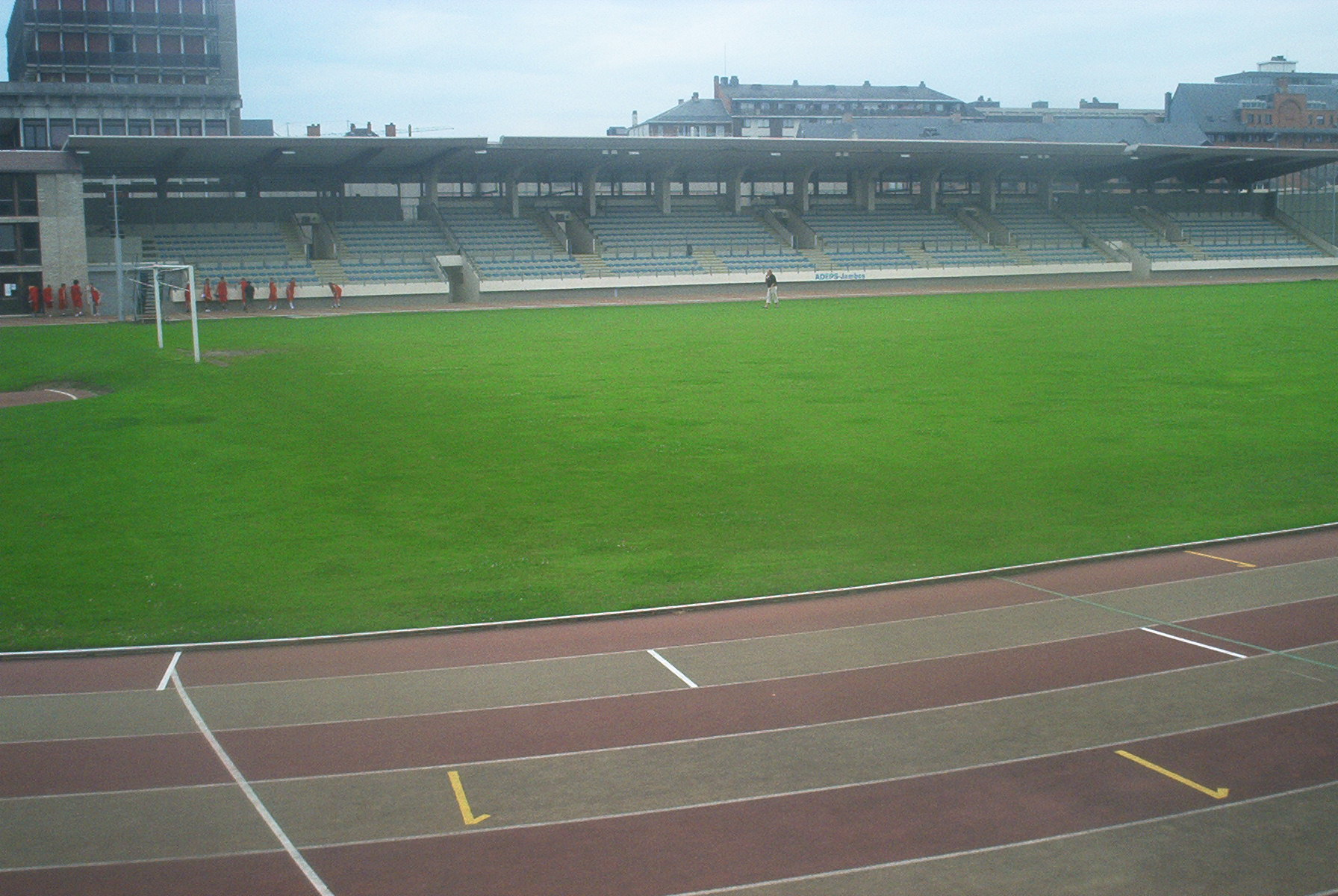 Le stade ADEPS de Jambes (vue de la tribune "assis").